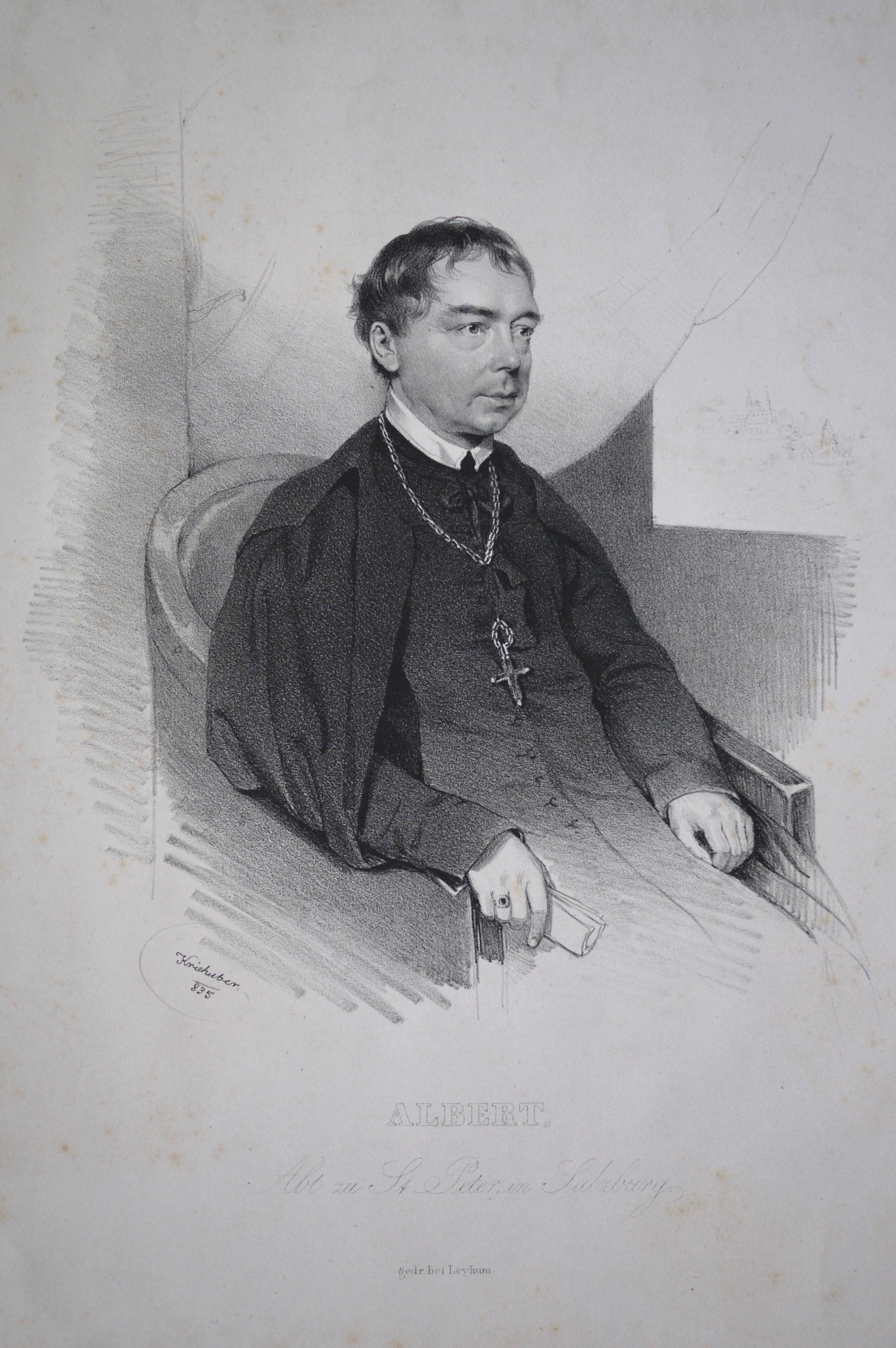 Albert Nagnzaun (1777-1856), Benediktiner, Abt von St. Peter in Salzburg. Lithographie von Josef Kriehuber, 1835